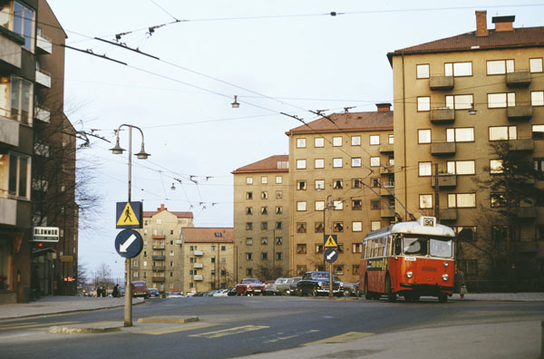 En trådbuss åker på linje 90 i Årsta på Gullmarsvägen, april 1964.